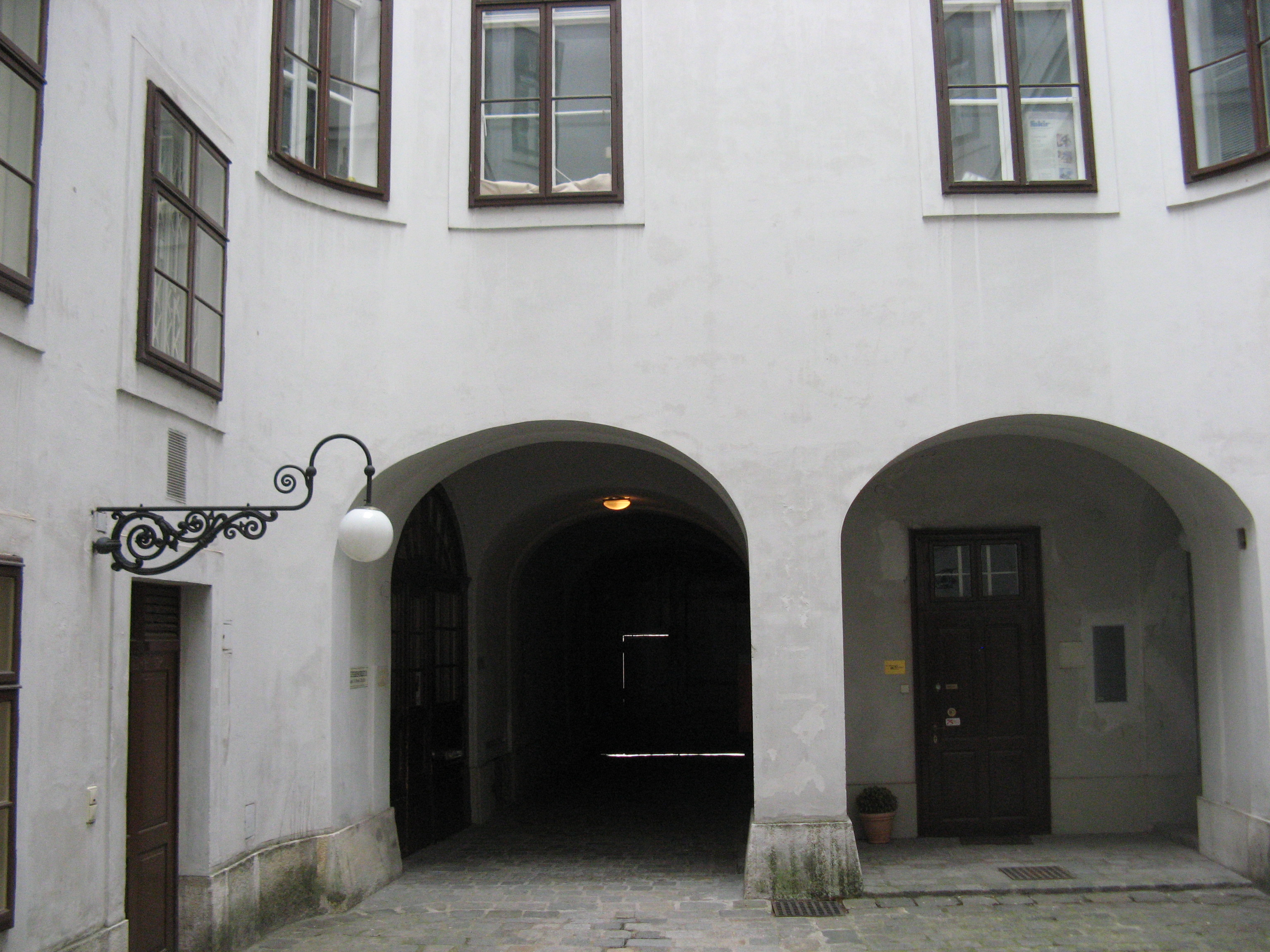 Pasqualatihaus, Innenhof (1791-1798) von Peter Mollner, Mölker Bastei 8, Wien-Innere Stadt